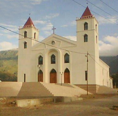 Kirche Santa Maria von Ainaro